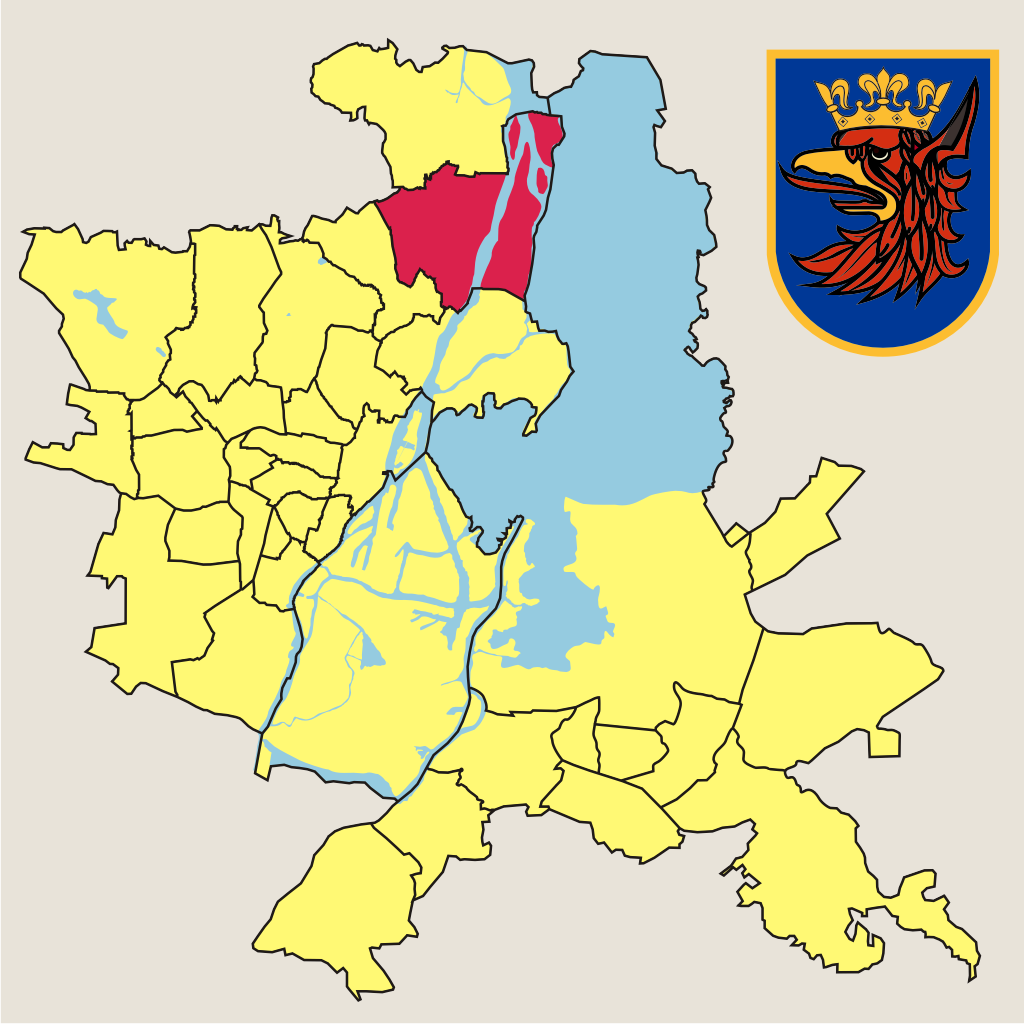 Osiedle "Stołczyn" w Szczecinie – jednostka pomocnicza miasta w 2010